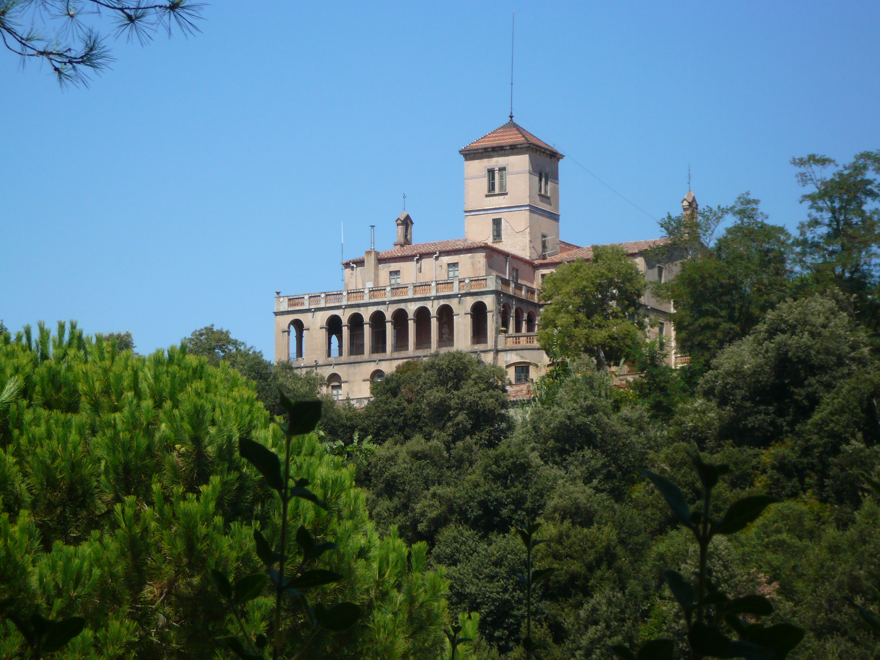 Vil·la Joana (Barcelona) Object location41° 25′ 11.24″ N, 2° 05′ 59.6″ E